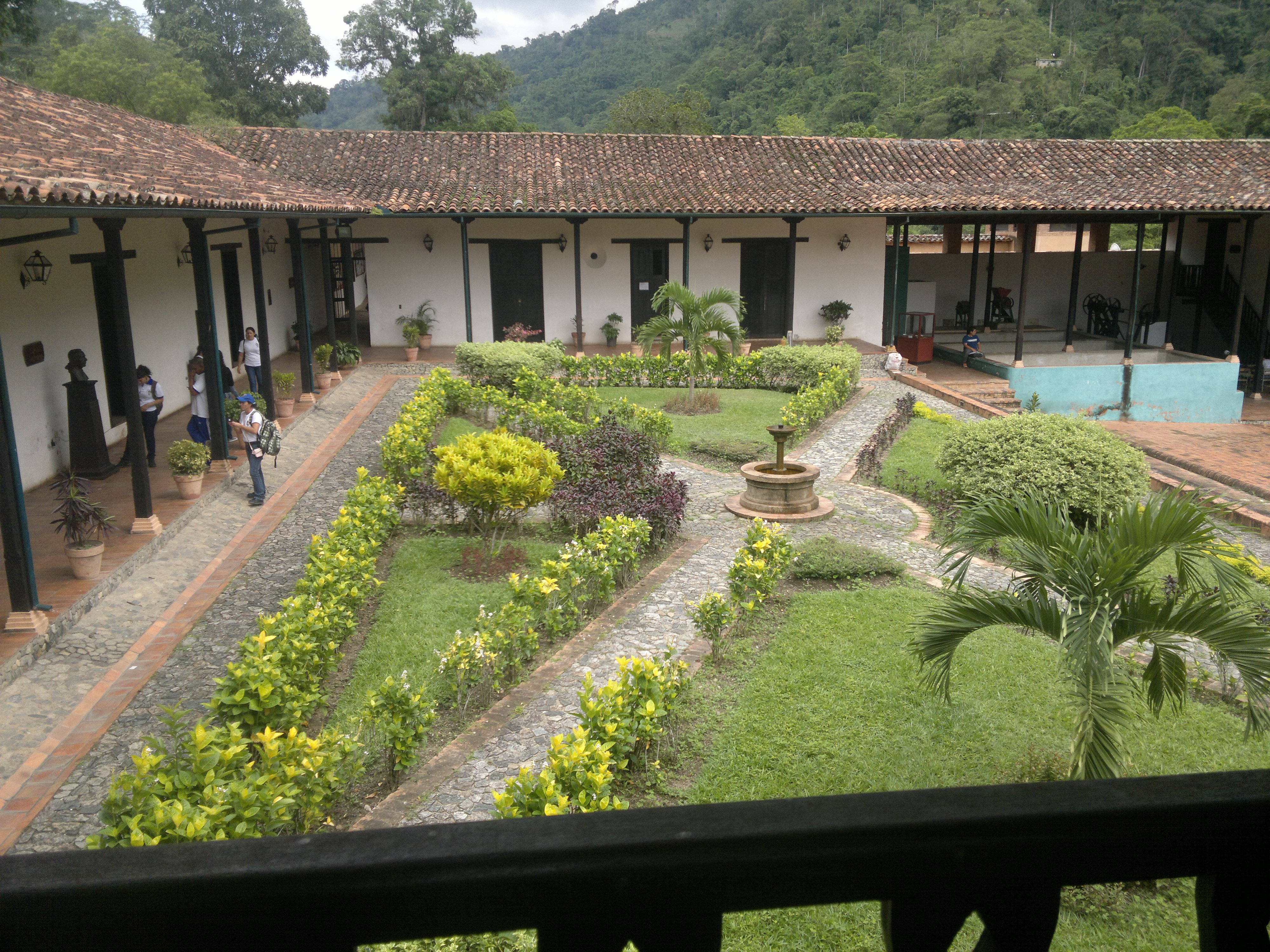 Mérida.